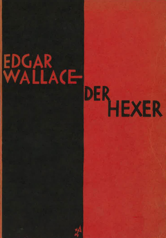 Edgar Wallace: Der Hexer. Wilhelm Goldmann Verlag, Leipzig 1927. DNB